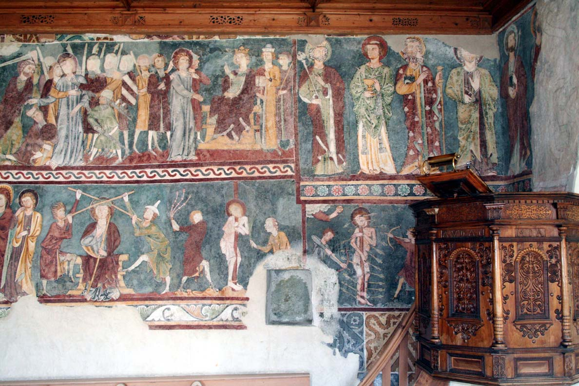 Geisselung